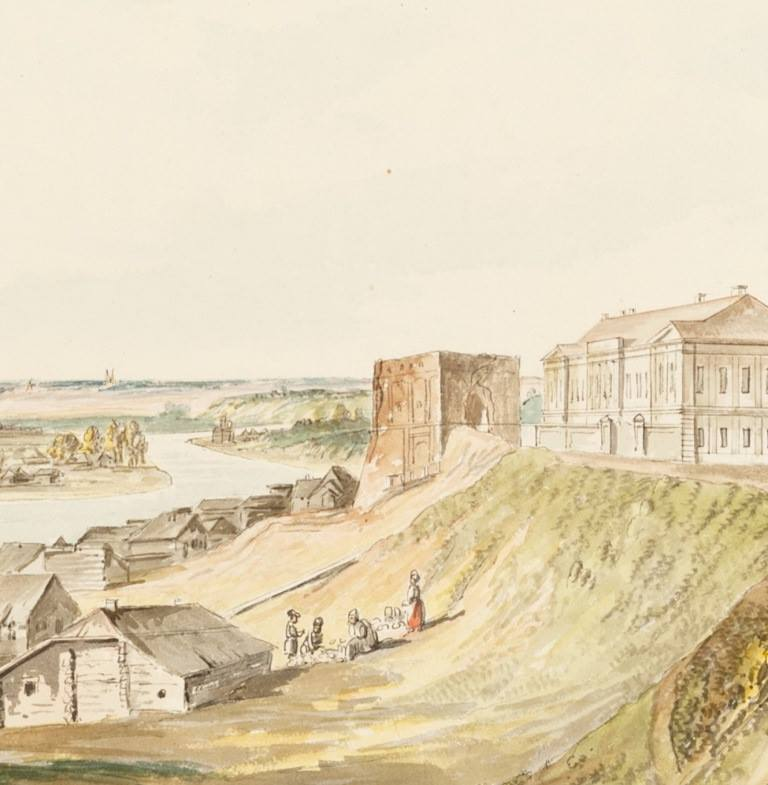 Беларуская (тарашкевіца): Магілёў (Mahiloŭ), Алейная брама (Alejnaja brama)